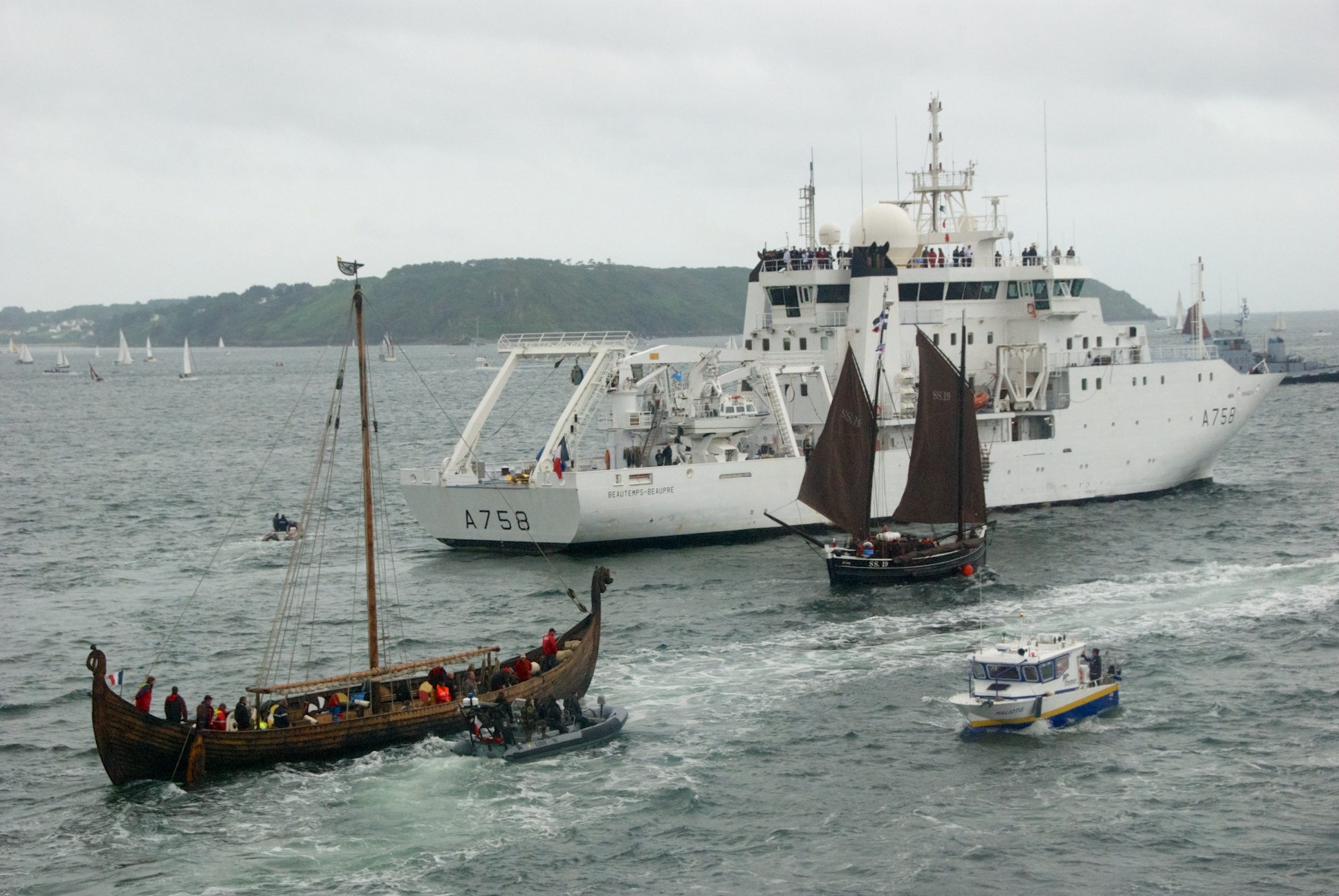 Tonnerres de Brest 2012 Armada Brest - Douarnenez : Le drakkar Dreknor, de Cherbourg. En arrière plan le Beautemps-beaupré de la marine nationale et devant lui le Ripple, un lougre de Cornouailles anglaise.